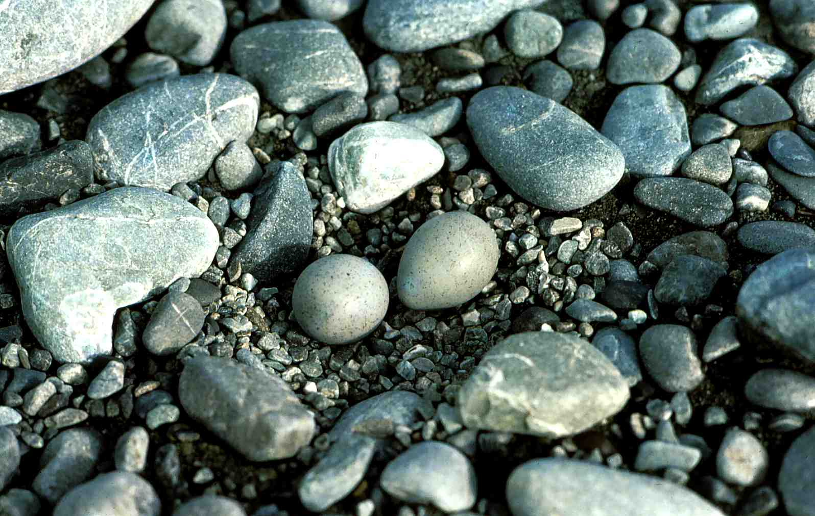 Wrybill eggs